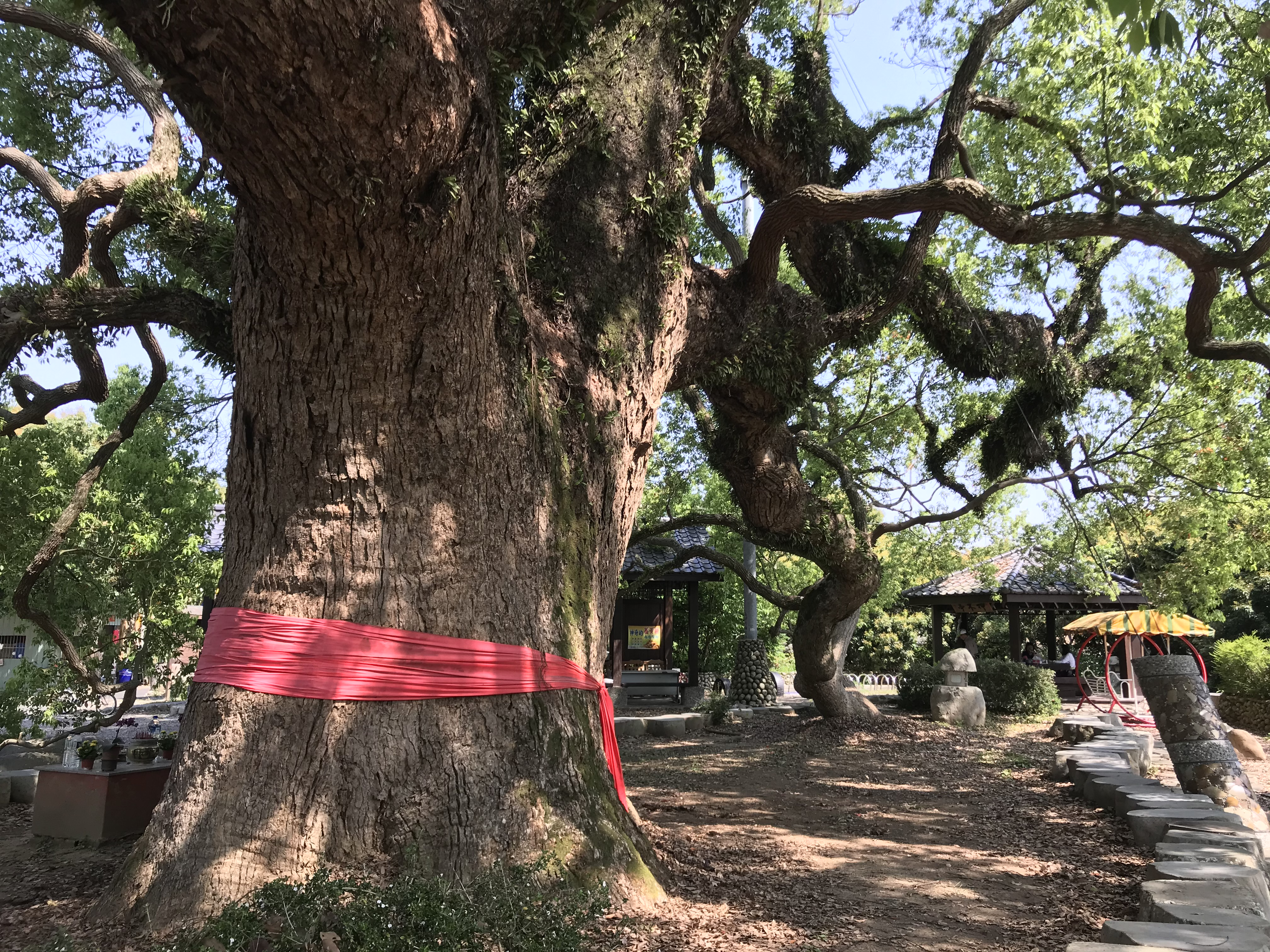 坪頂七股神木樹下